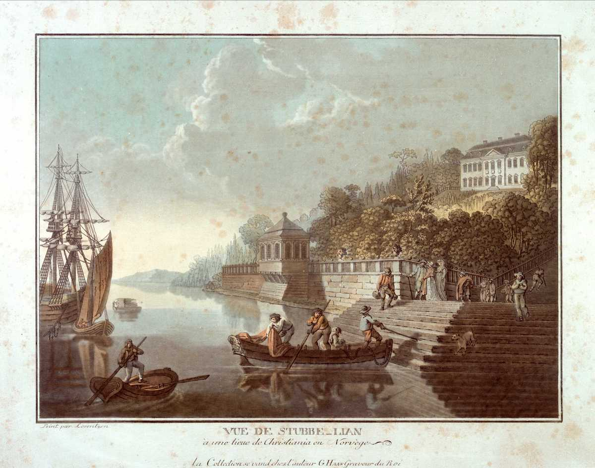 Vue de Stubbeljan